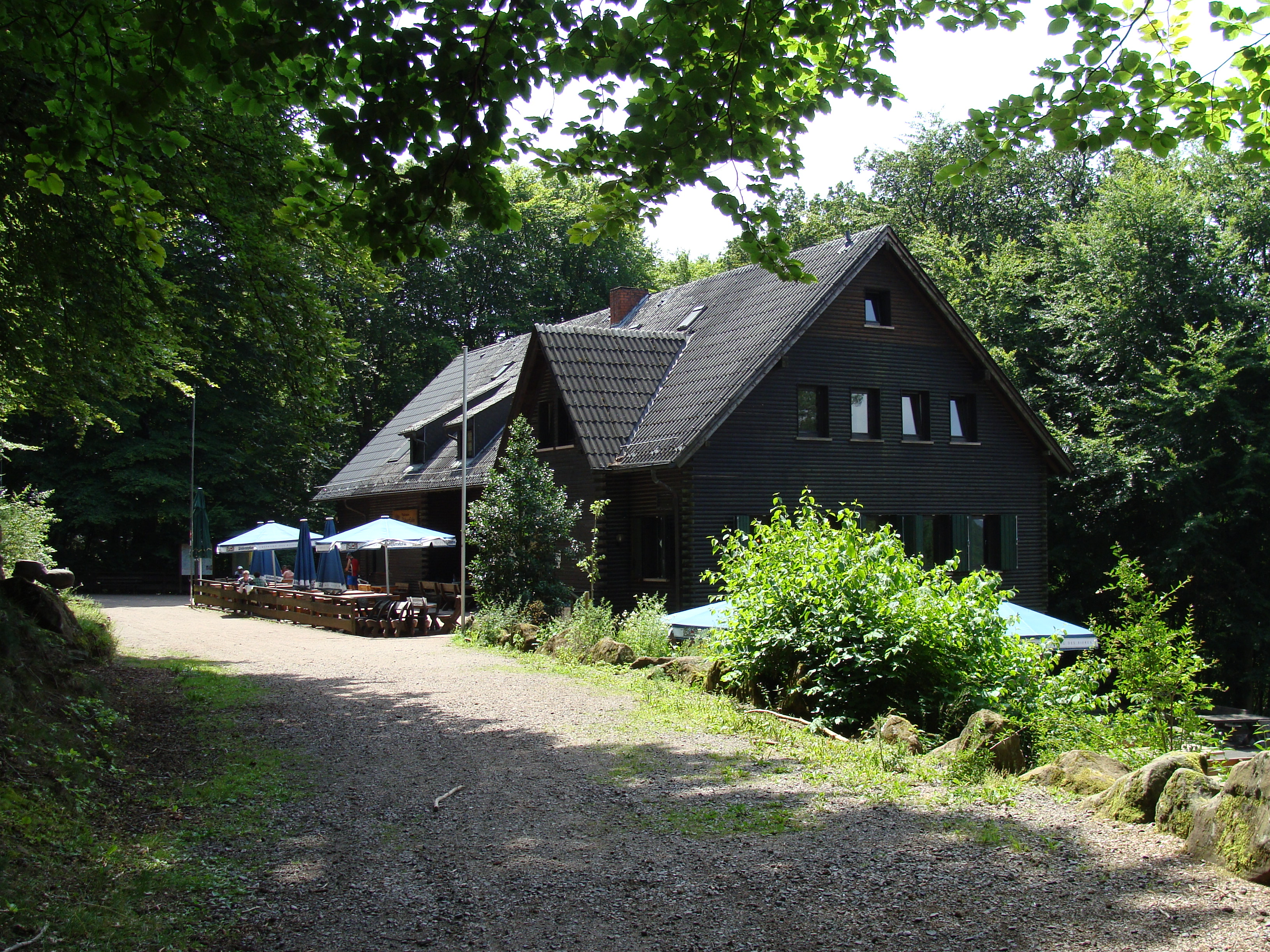 Wanderheim Dicke Eiche (Hauensteiner Hütte) PWV-Hütte im Pfälzerwald